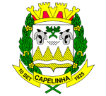 Brasão_Capelinha_MG.gif